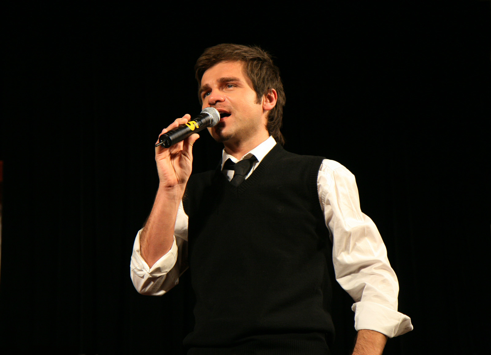 Łukasz Zagrobelny